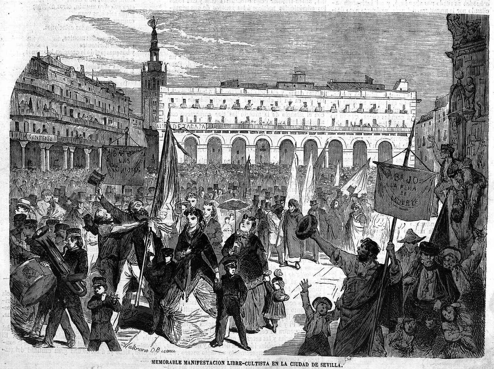 «Memorable manifestación libre-cultista en la ciudad de Sevilla», en la revista española El Museo Universal.